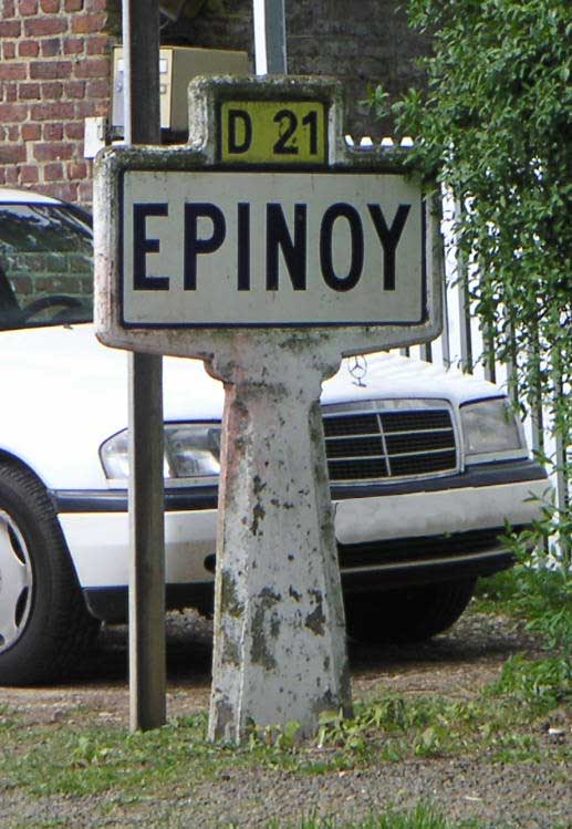 Panneau d'accueil dans la commune D'Épinoy (Pas-de-Calais) Image prise par Padawane le 19 mai 2005 Padawane